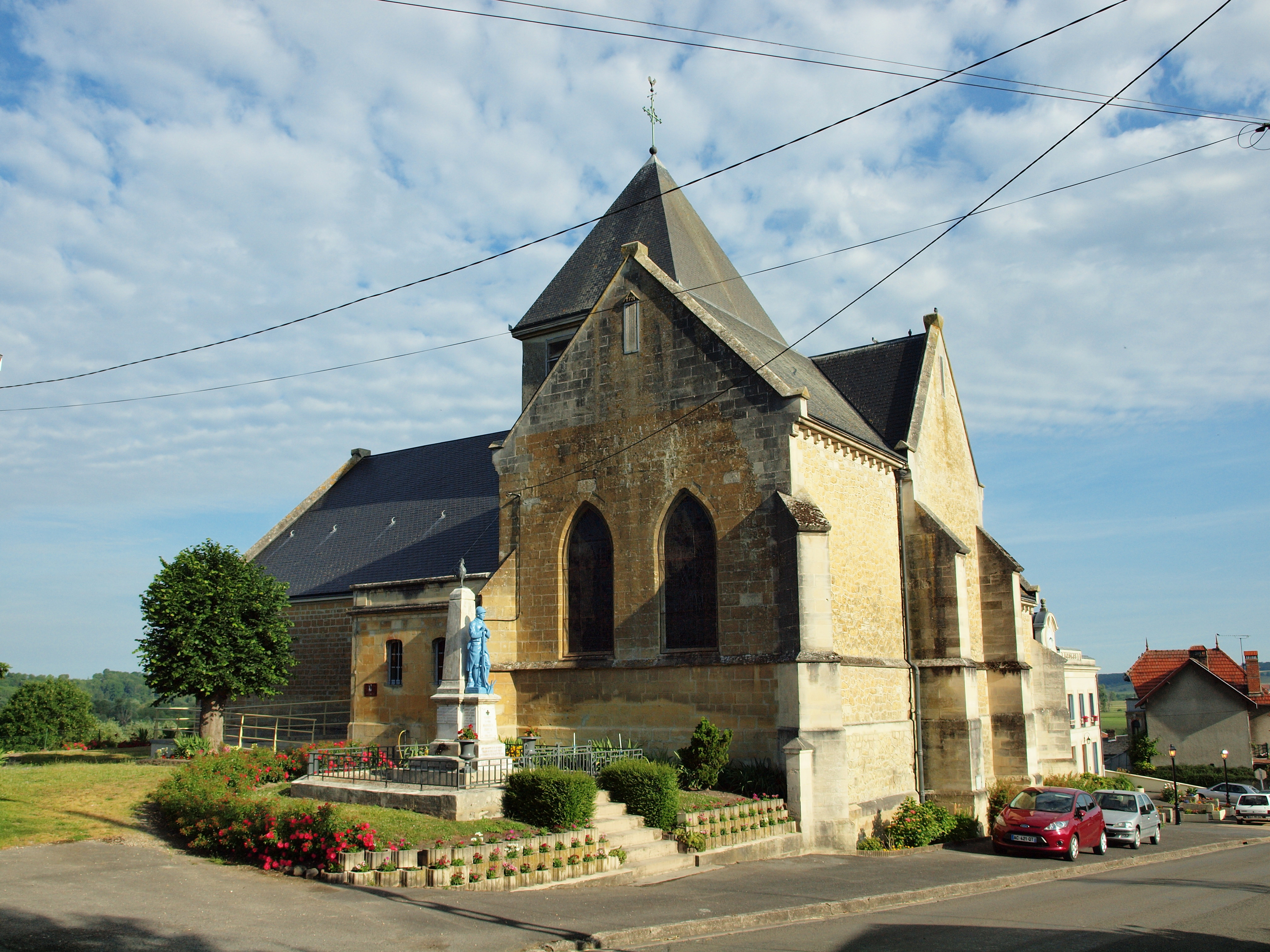 Vandy (Ardennes, France)